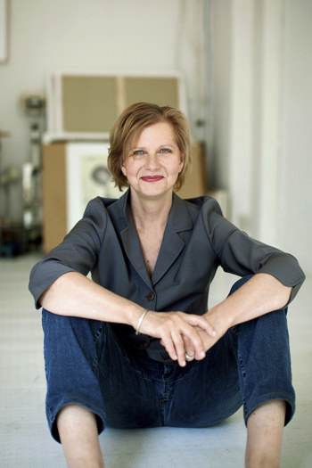 Frau Nicole Haase Filmschauspielerin, Theaterschauspieler, Hörspielsprecherin aus Berlin